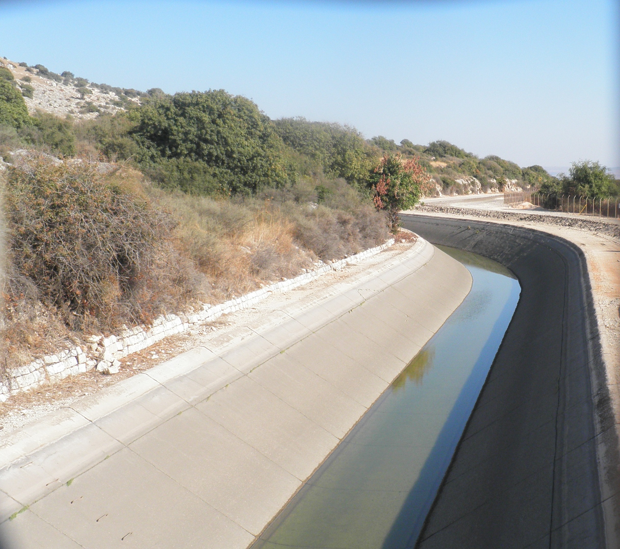 המוביל הארצי